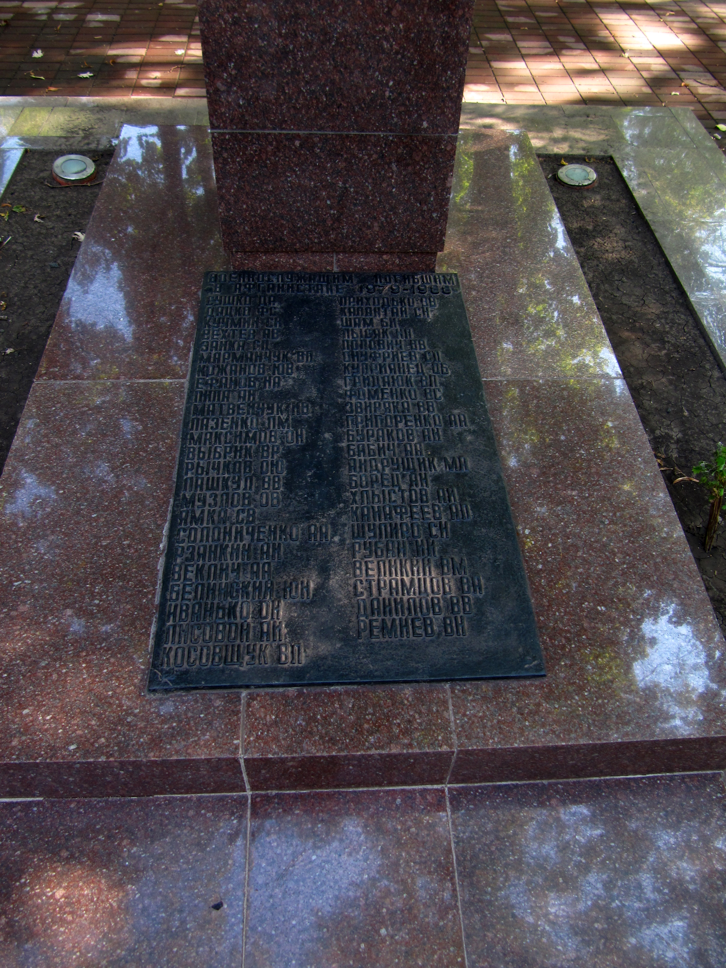 Пам’ятник воїнам-інтернаціоналістам, Кривий Ріг, восени 2013р. демонтовано з "Скверу Героїв", що біля міськвиконкому, та перенесено на алею Небесної Сотні, у сквер на пр.Миру, між виконкомом Дзержинського р-ну та монументом "Перемога"